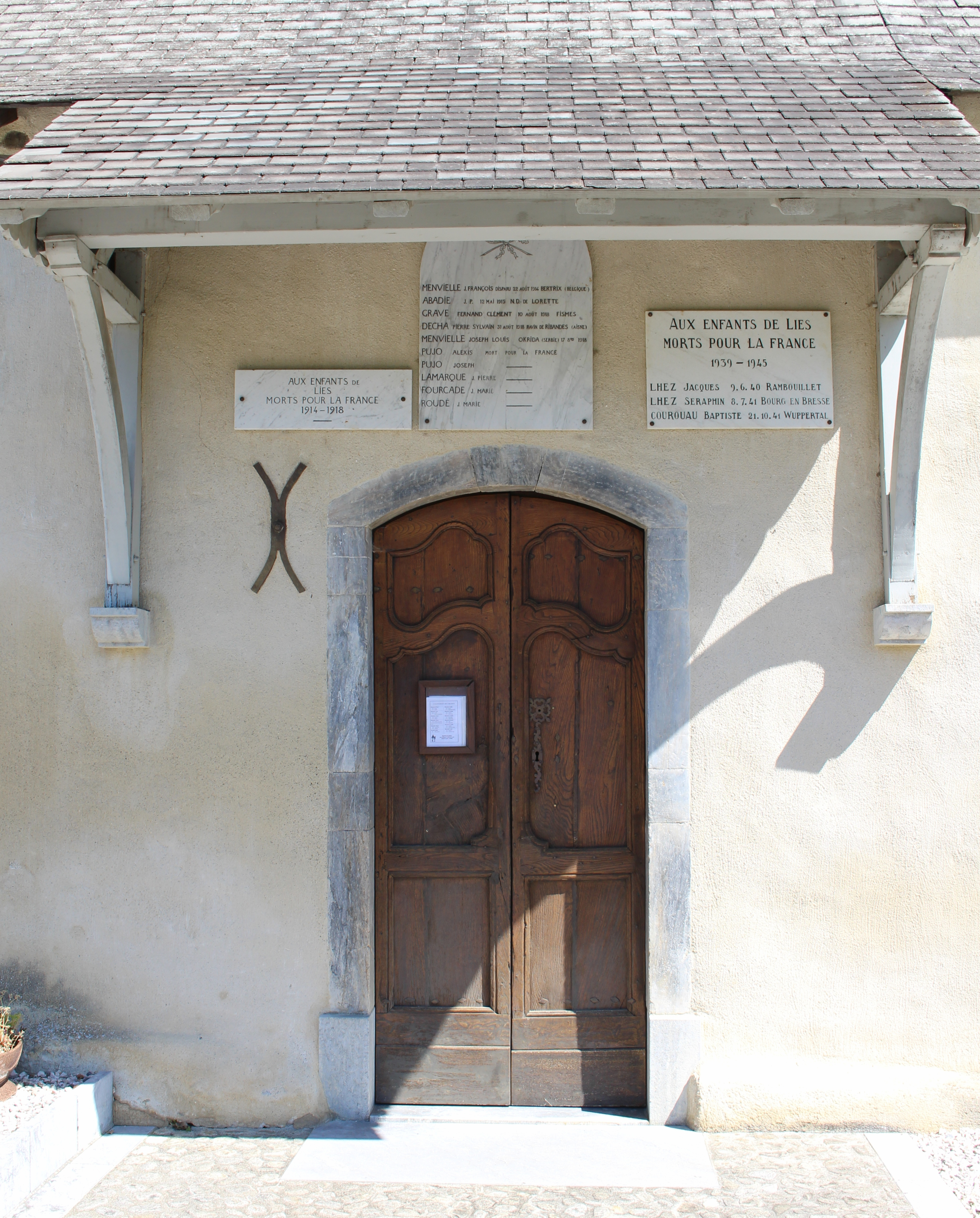 Monument aux morts de Lies (Hautes-Pyrénées)